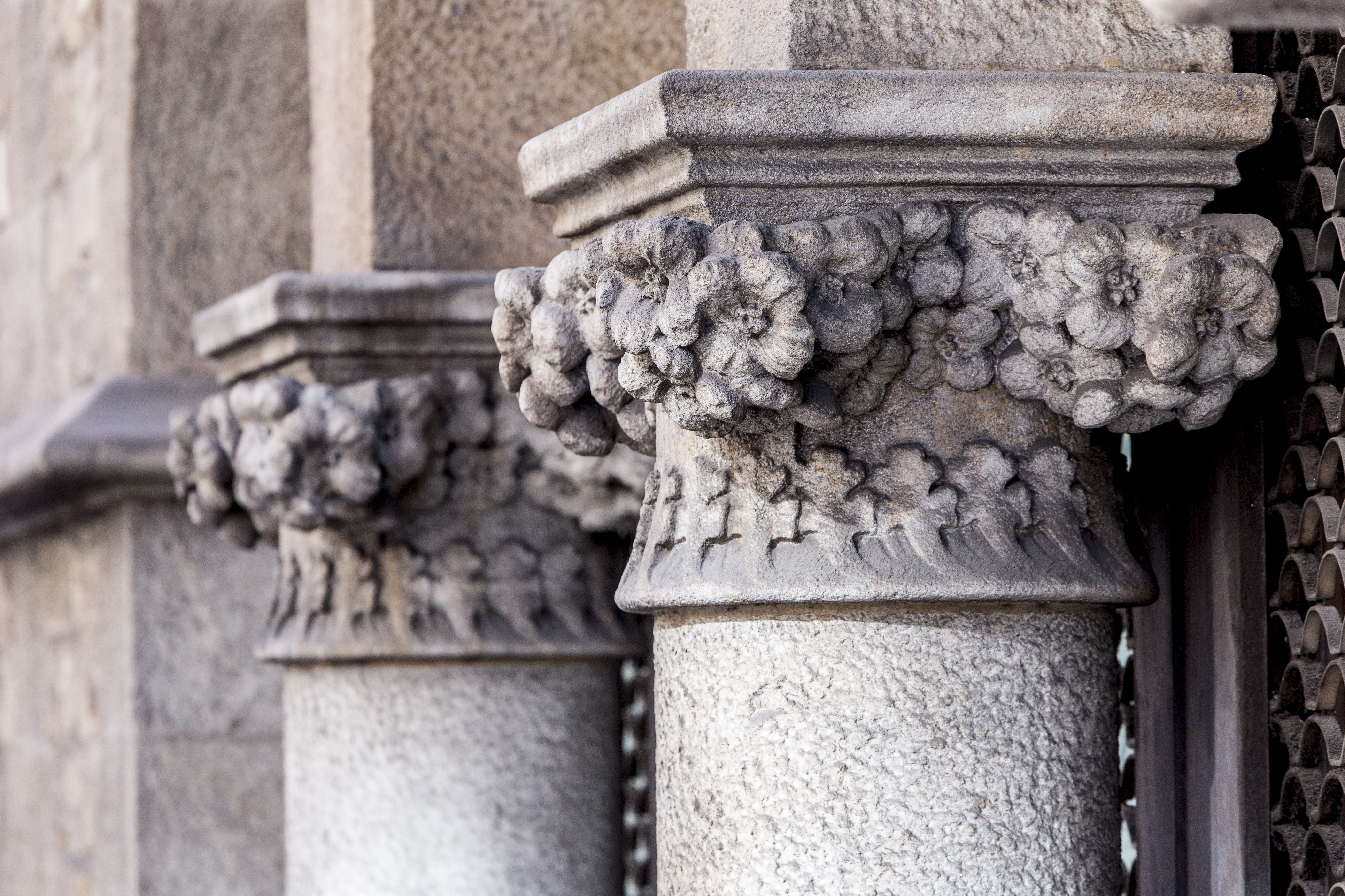 Detalle ornamento floral, columna Casa de les Punxes